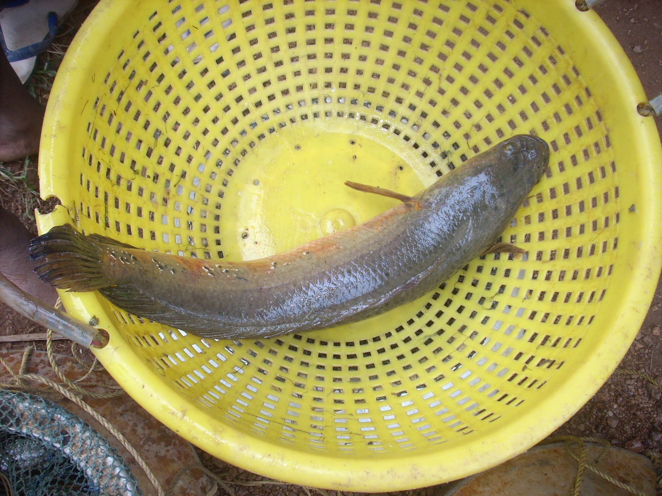 വയല്‍കാഴ്ചകള്‍. അടാട്ട്, ഒമ്പതുമുറി പാടം, തൃശ്ശൂര്‍ This media file is uploaded with Malayalam loves Wikimedia event - 2.